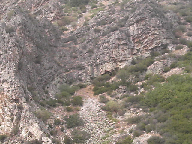 Flanco de un pliegue inserto en un manto de corrimiento. Santa Lucía de Gordón. León. España.